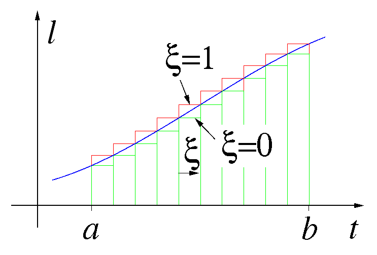 Abschätzung eines Integrals mittels Treppenfunktionen